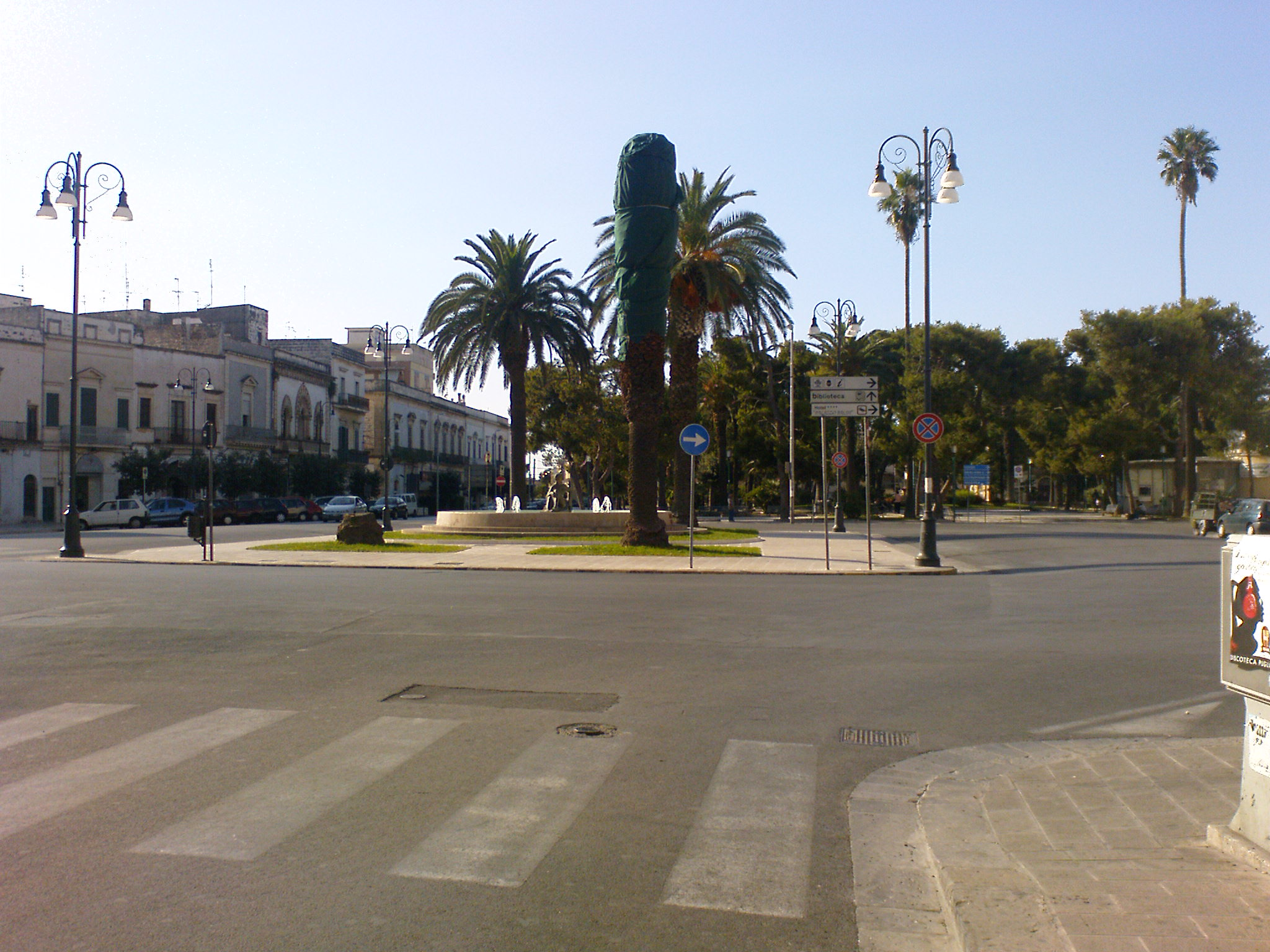 La pupa di Galatina. Foto scattata da Matteo Apollonio